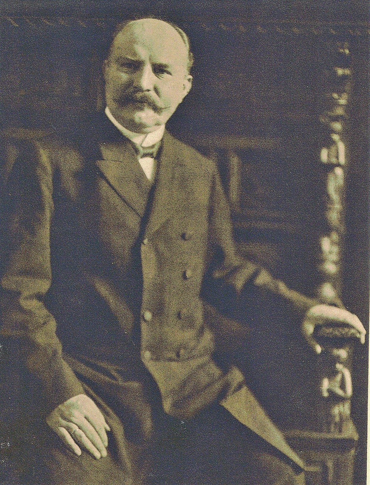 Johannes Semler (1858–1914), deutscher Rechtsanwalt und Politiker